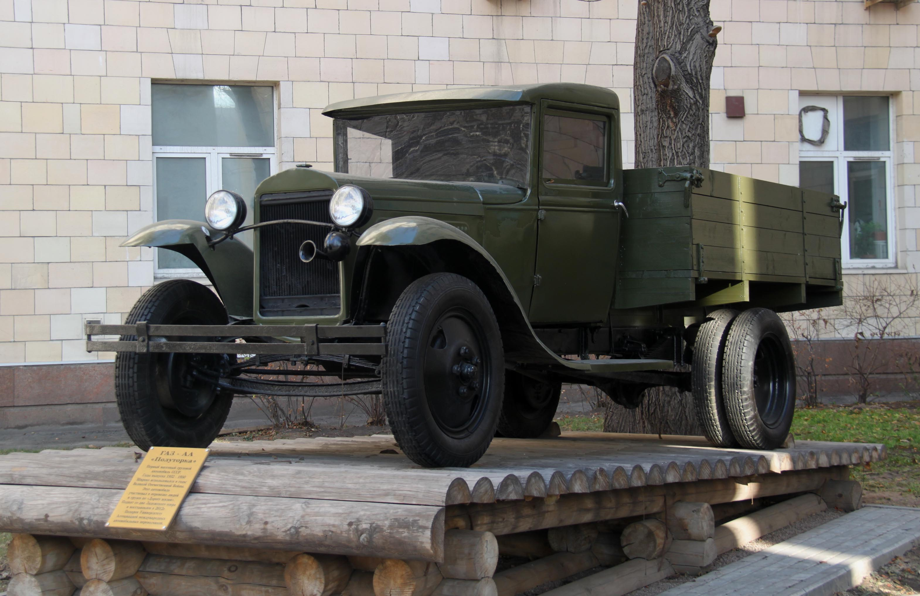 Памятник ГАЗ-АА возле Московского автомобильно-дорожного государственного технического университета. Автомобиль участвовал в перевозке людей и грузов по Дороге жизни. Поднят со дна Ладожского озера, восстановлен и подарен институту